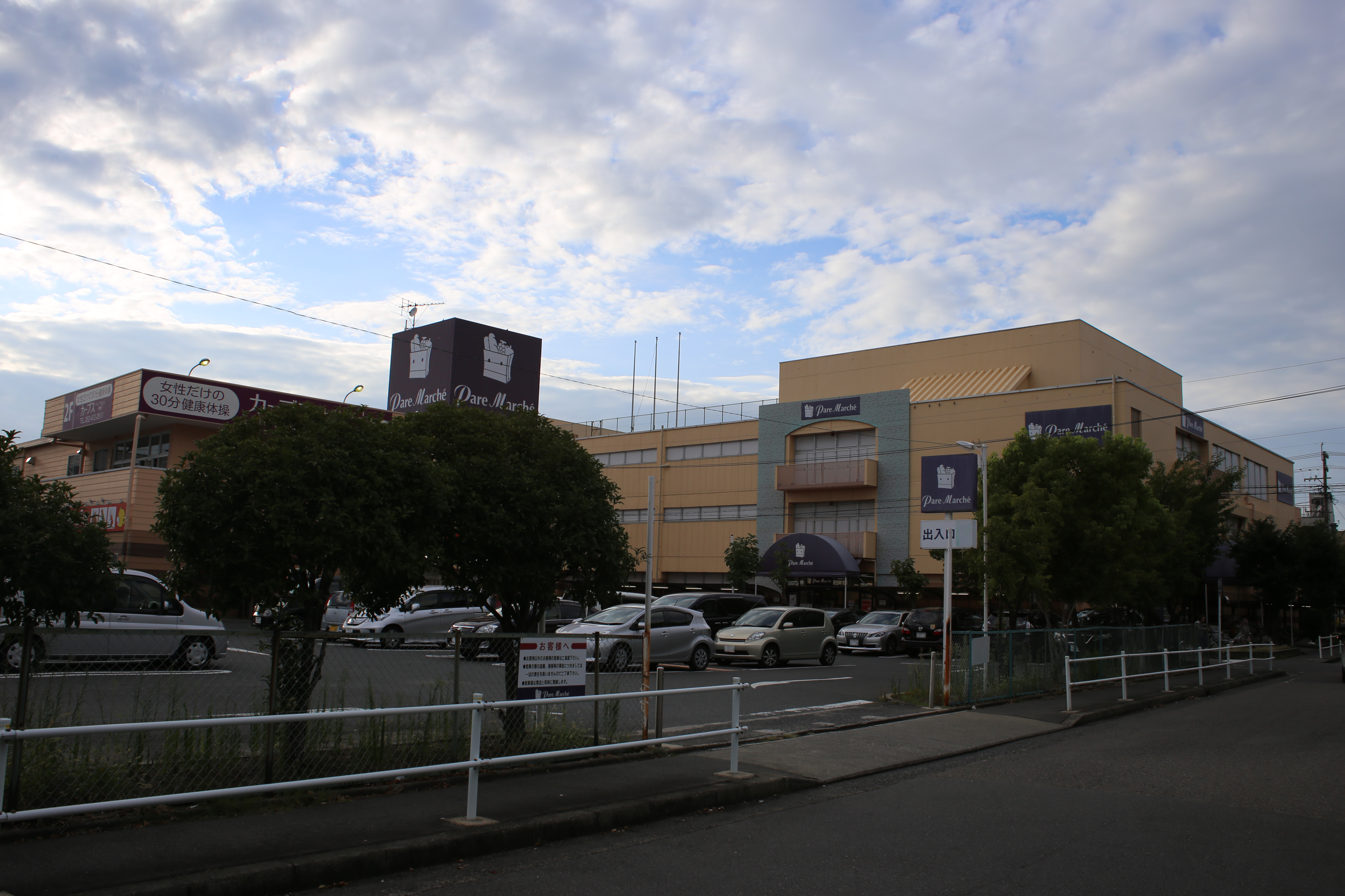 名古屋市中村区剣町のパレマルシェ中村店を東側公道南側より撮影。ただし、ナンバープレートにつき画像処理済。